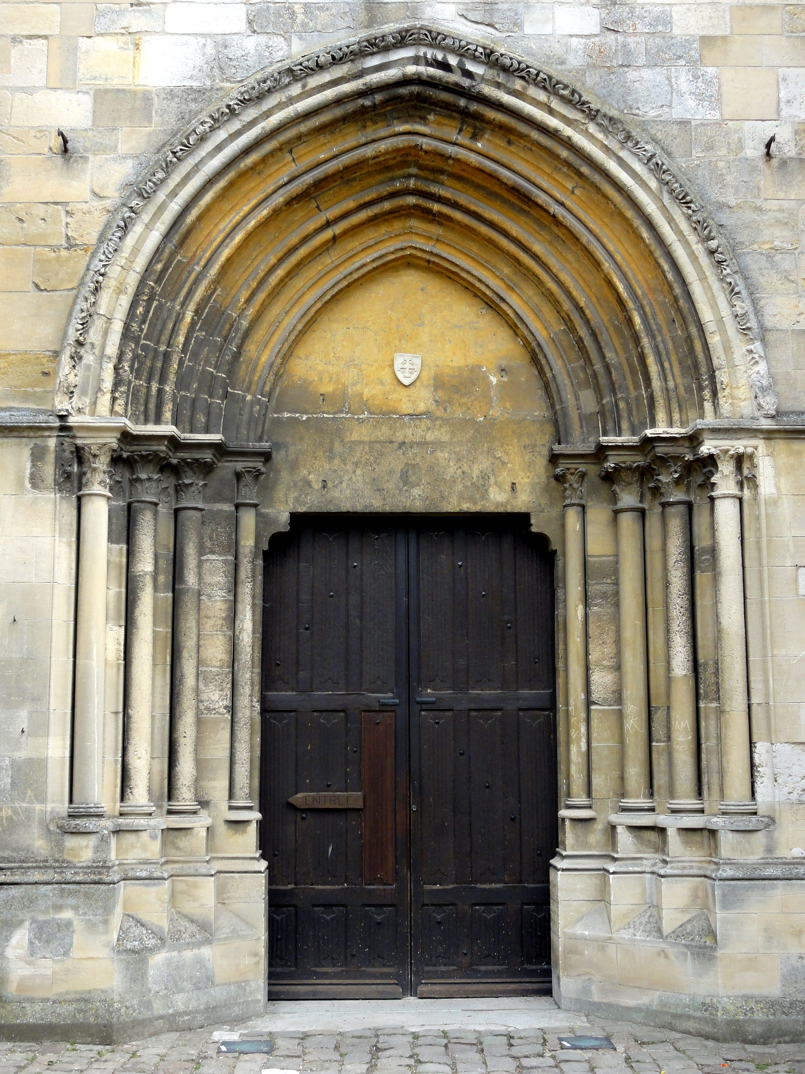 Portail occidental.